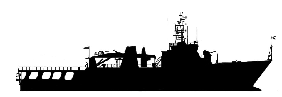 Polish Navy ship ORP Kontradmirał Xawery Czernicki